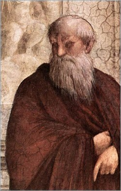 Filosofo paveikslas